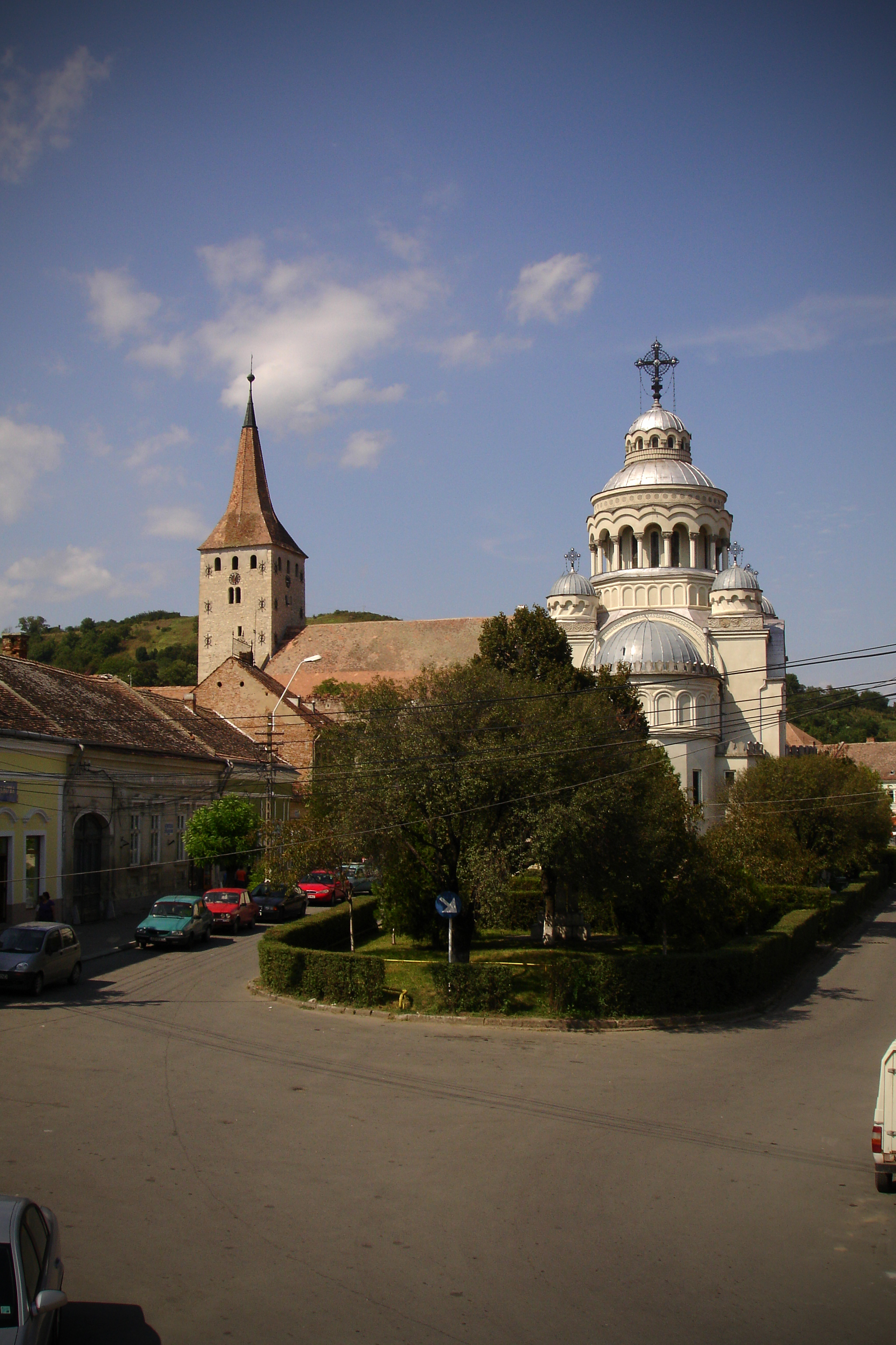 Cetatea Aiudului, localitatea Aiud, judetul Alba, sec. XIII-XVIII